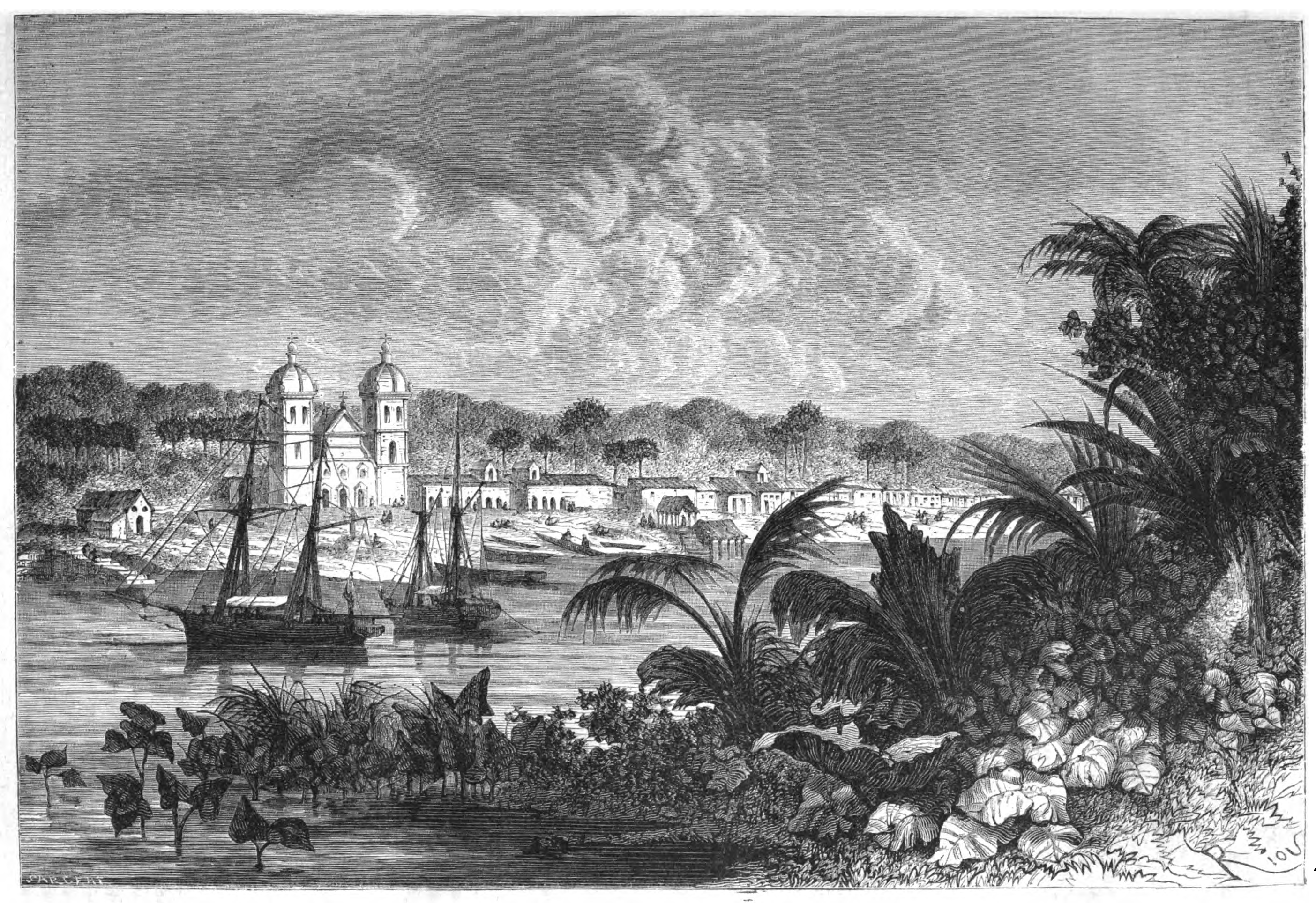 Velha visão da Vila Sant'Ana de Igarapé-Miri. por Edouard Riou